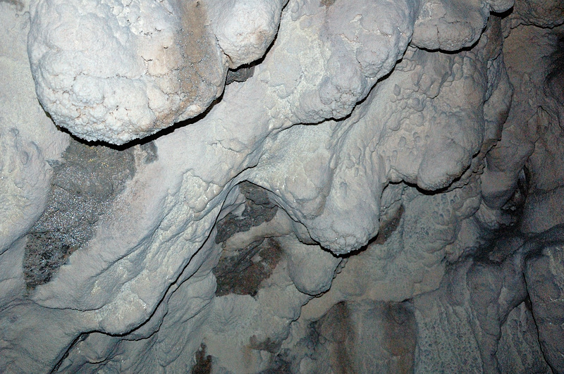 Mondmilch in der Bergmilchkammer 1862/20